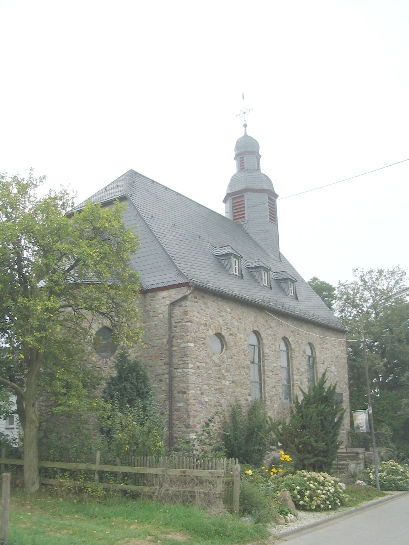 Kapelle Sargenroth/Hunsrück